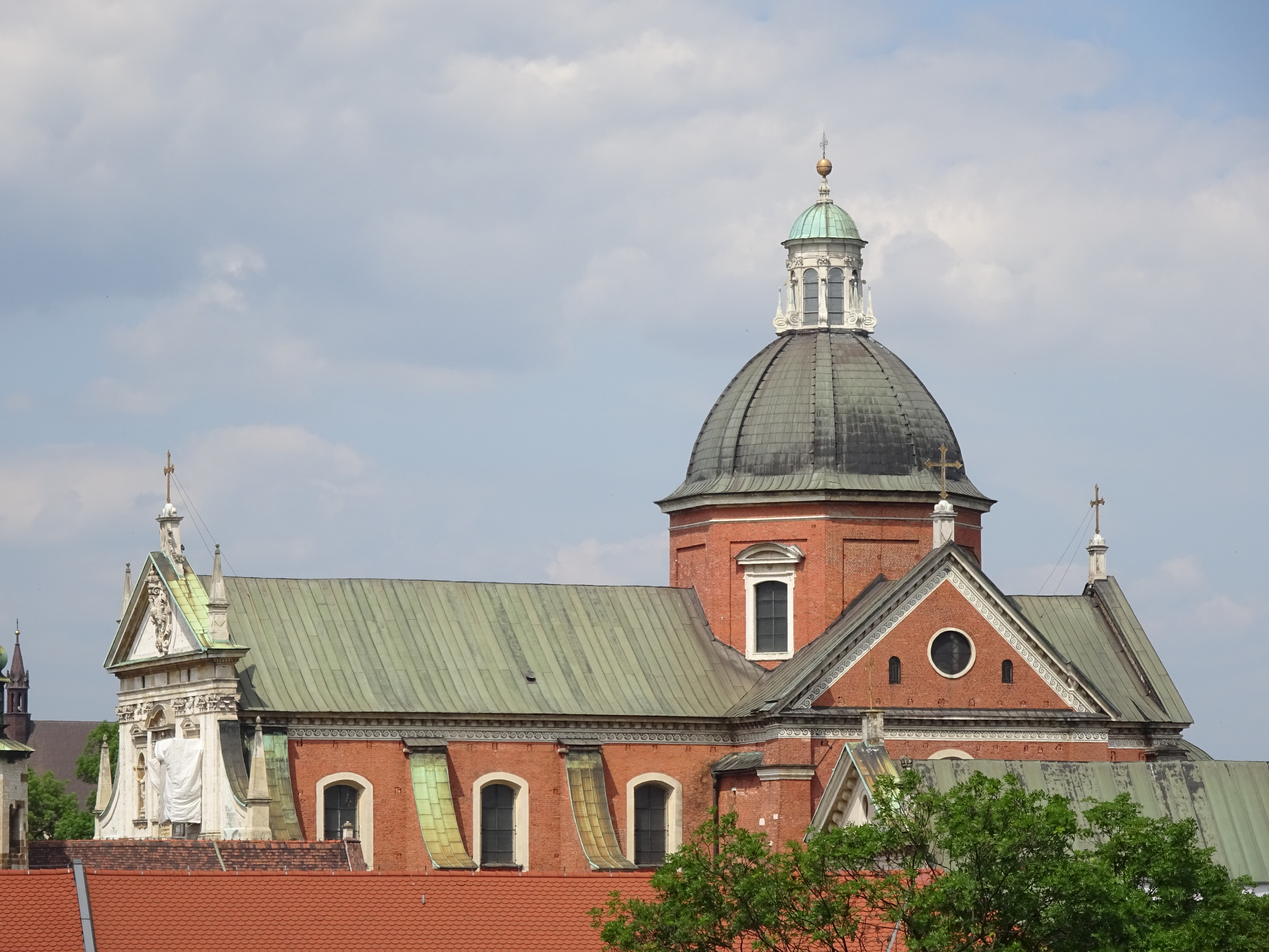 Kościół św. Apostołów Piotra i Pawła w Krakowie przy ul. Grodzkiej 52a. Widok z Wawelu. 2016